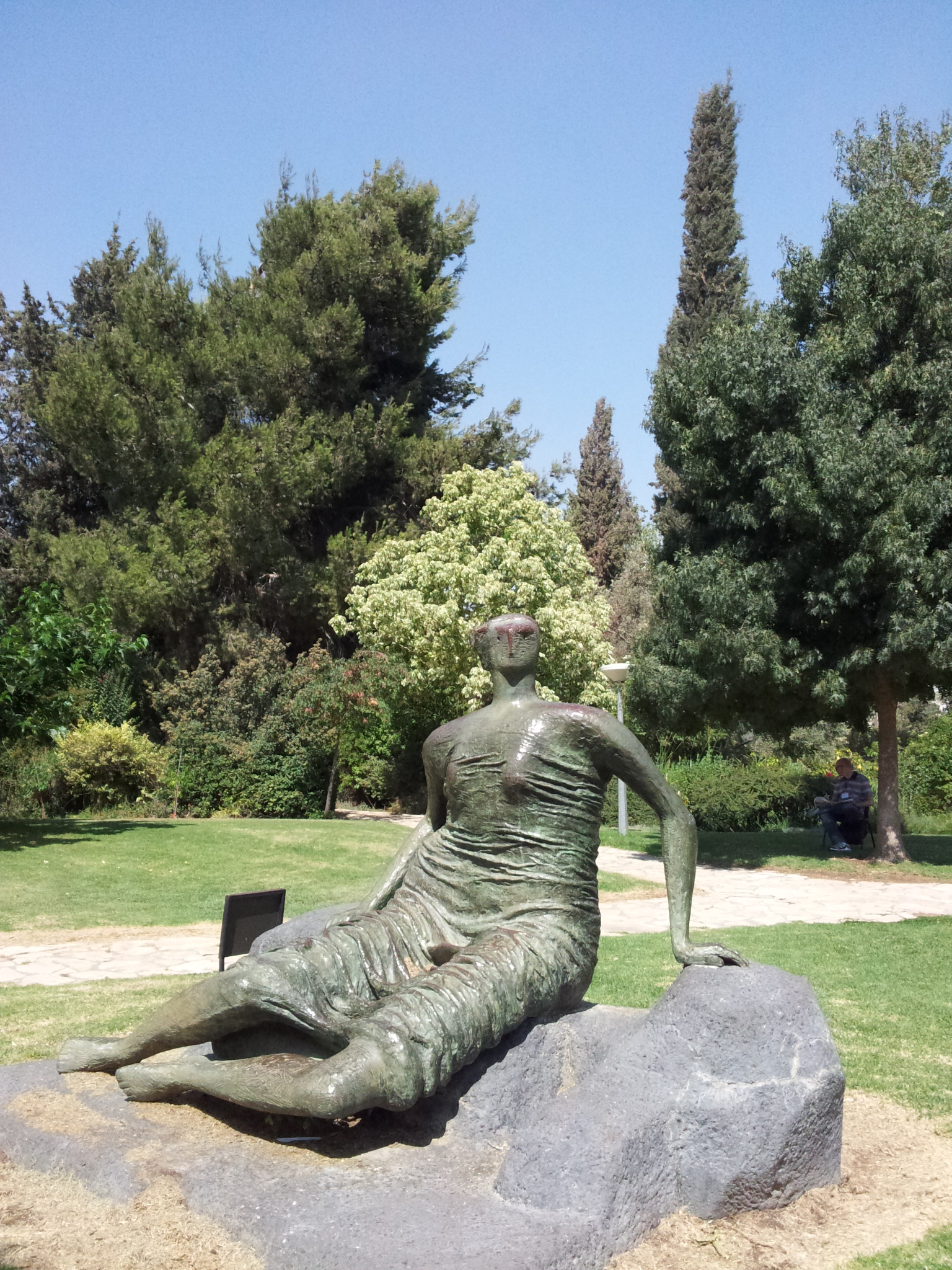 Henry Moore - Draped seated figure - 1